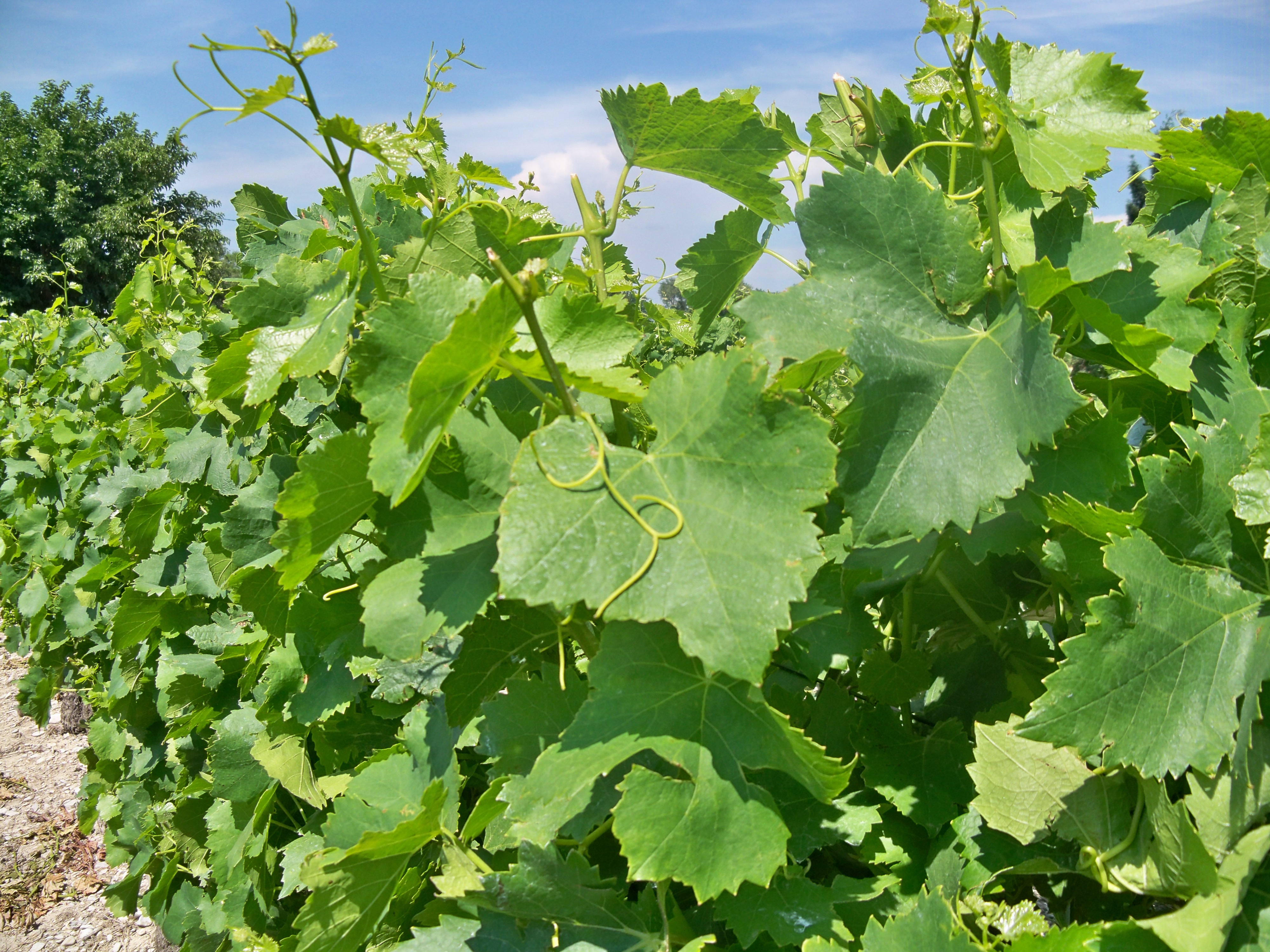 Feuilles de Vignes - Grenache Noir